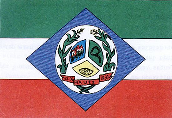 Bandeira de Maués, AMazonas.